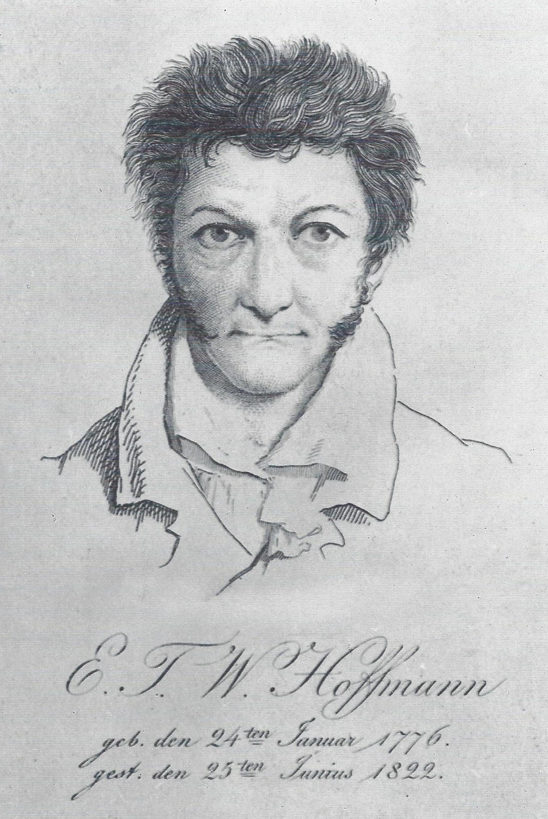 VI.20. E.T.A. Hoffmann: Selbstporträt